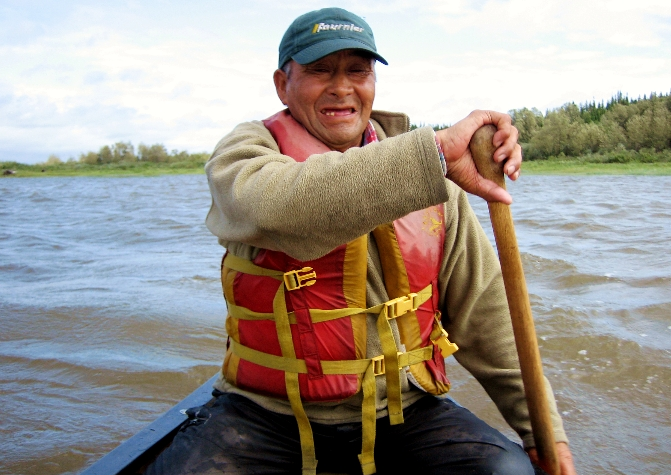 Indian Cree du nord du Québec. Je suis l'auteur de cette photo (André Perron) / Own Work